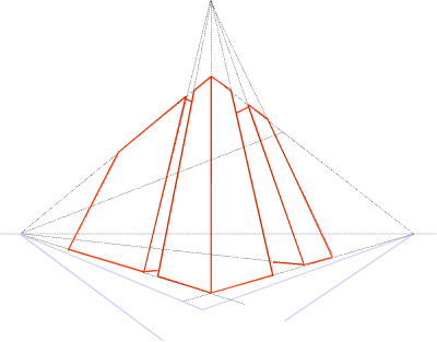 Drie verdwijnpunten, eigen werk